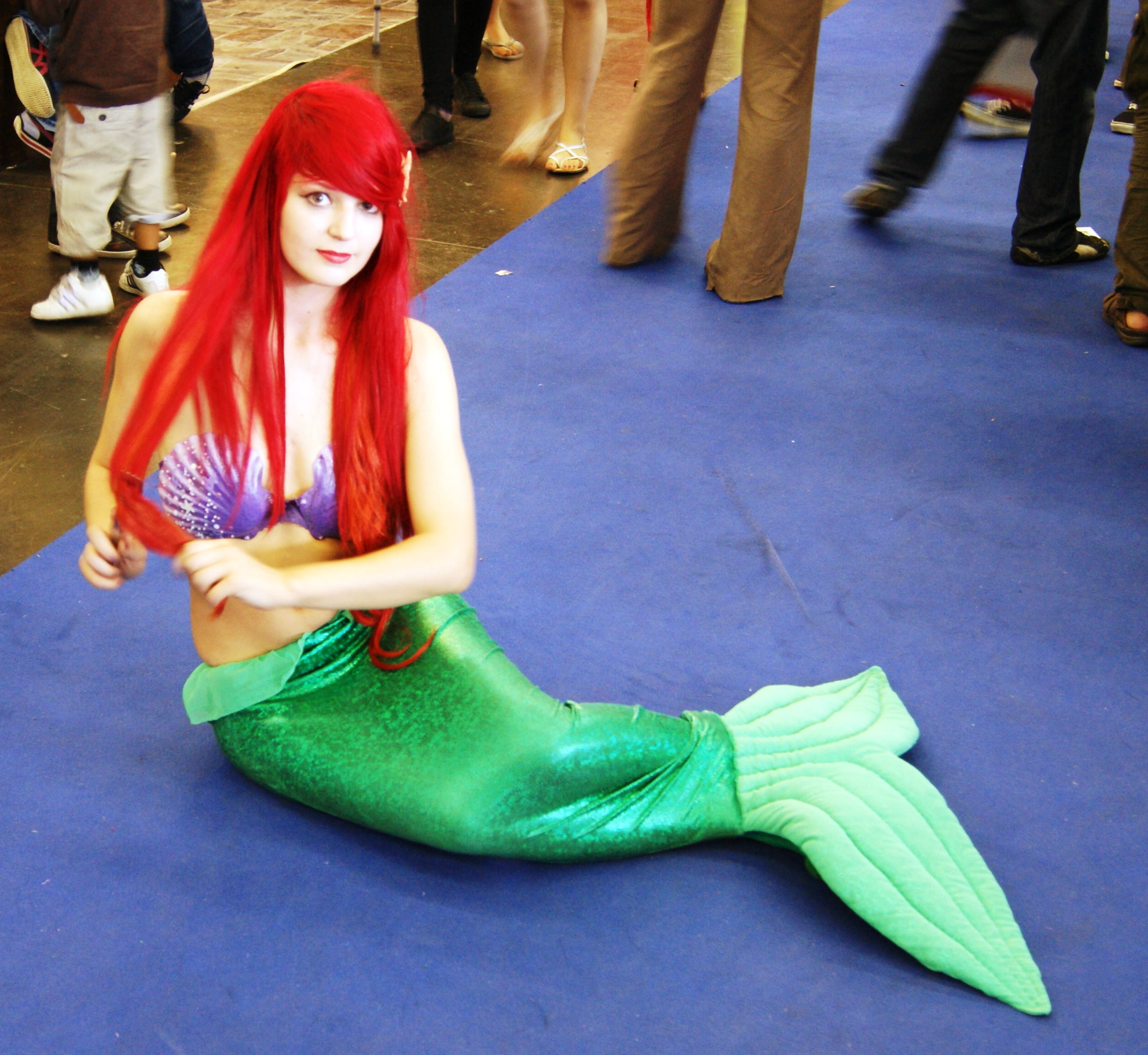 Cosplay - Japan Expo 2012